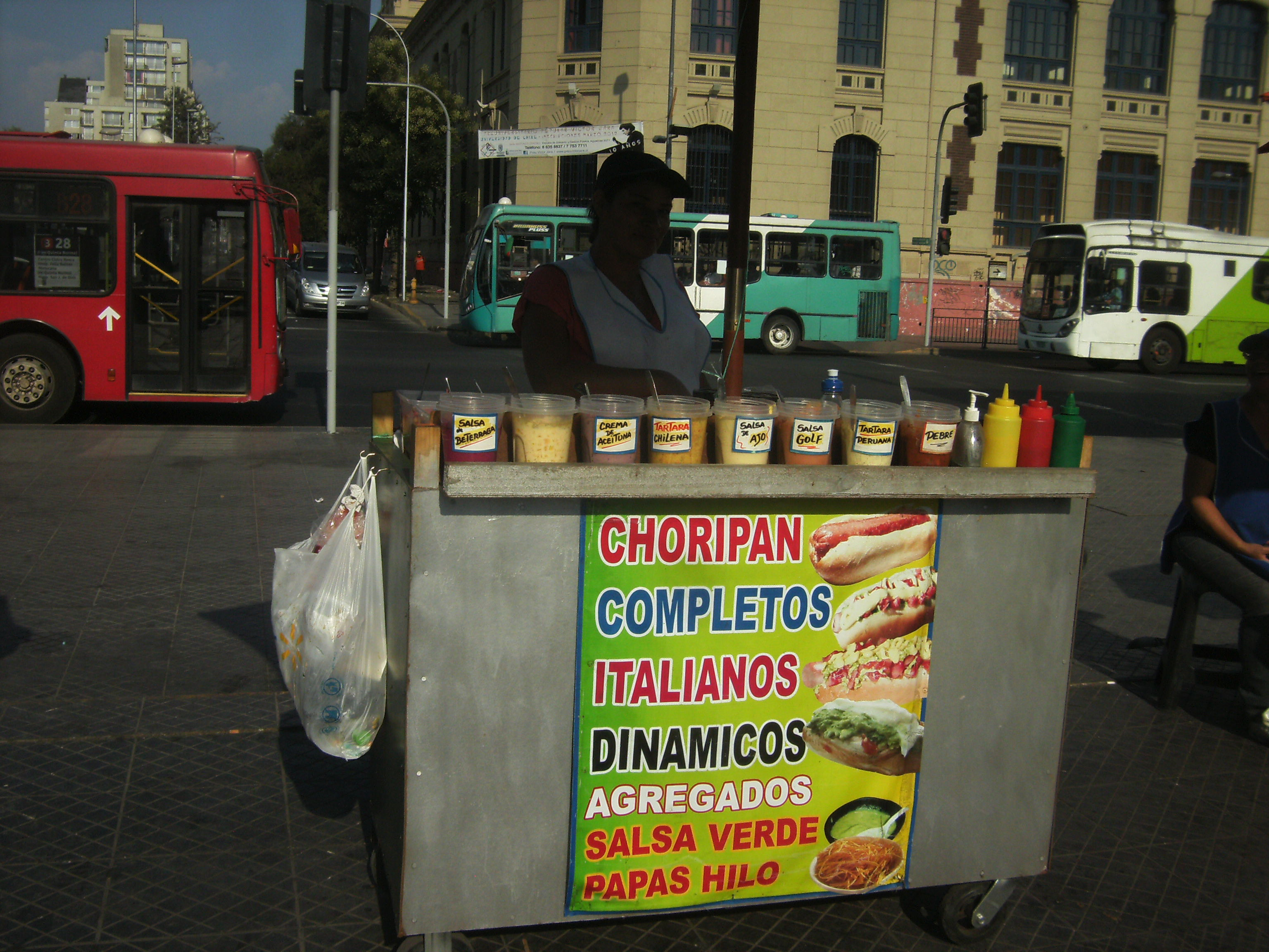 Puesto callejero en Santiago de Chile que vende distintos tipos de Completos o perros calientes.